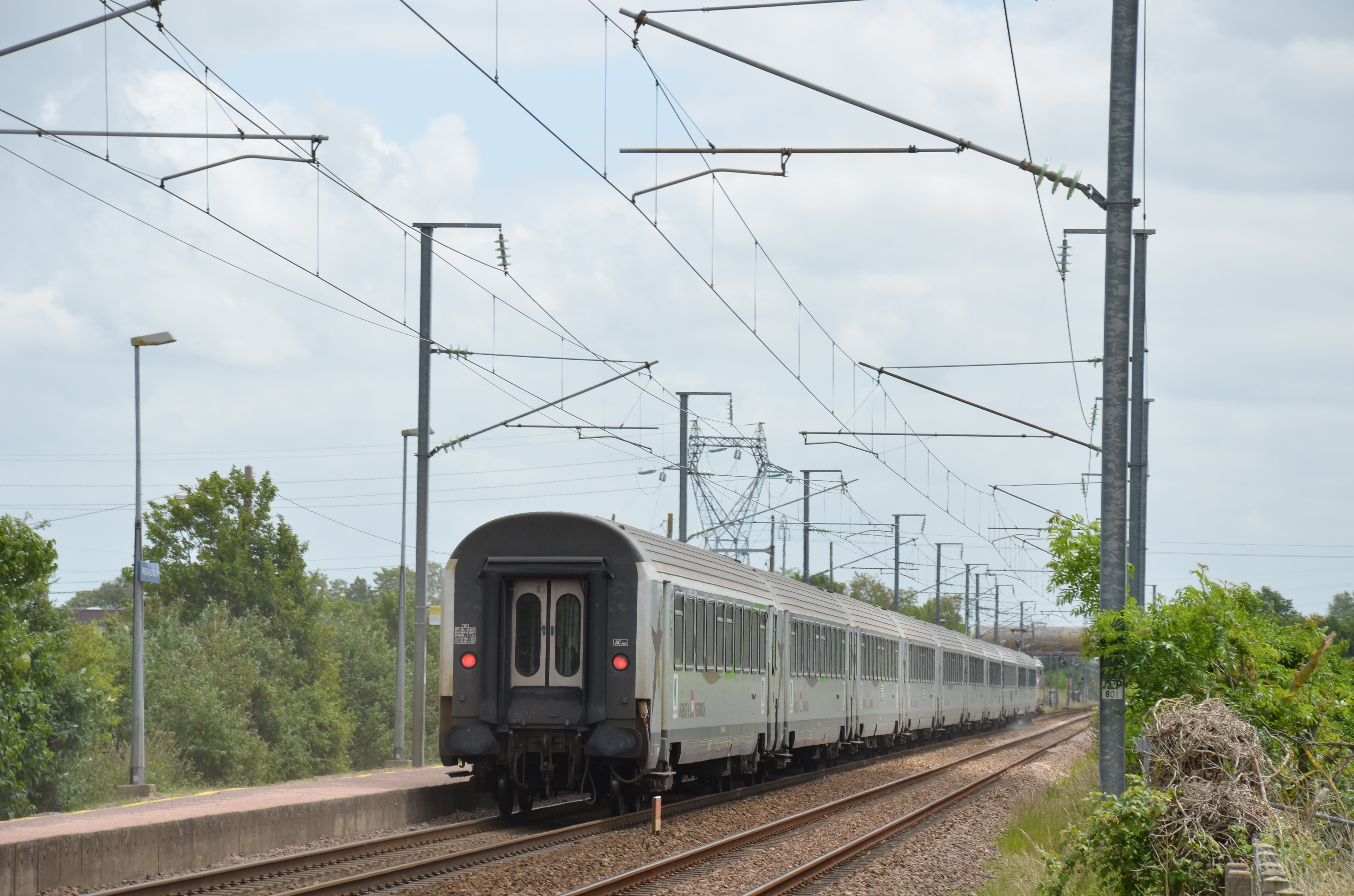 BB 15025 + Corail assurant la liaison Caen / Paris Saint-Lazare, en gare de Frénouville-Cagny (train n°3344).